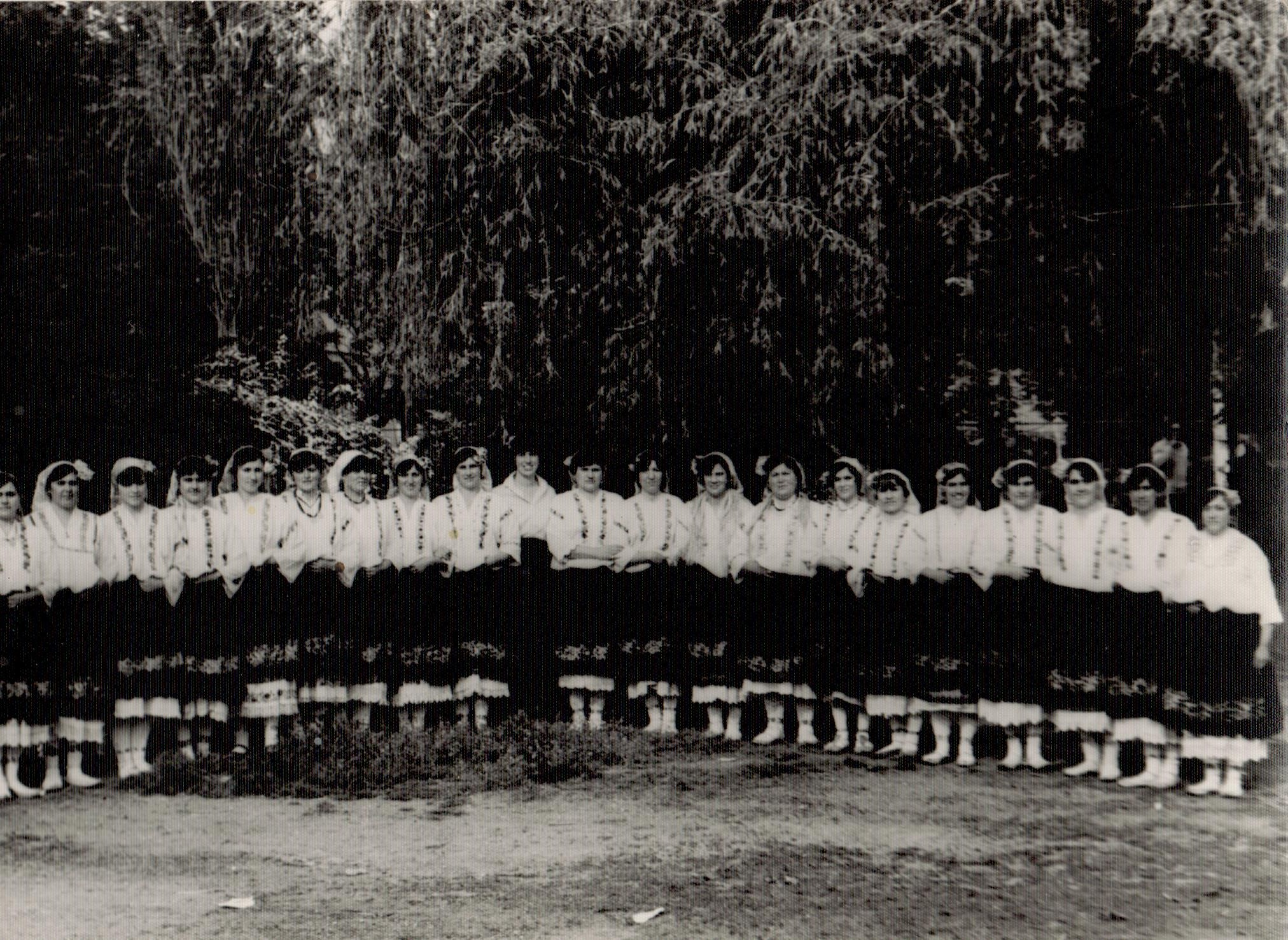 Певческа група към Народно читалище "Светлина - 1928" с.Неговановци с ръководител Виолета Асенова